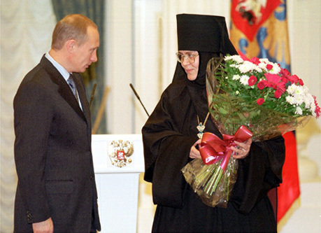 МОСКВА, КРЕМЛЬ. Церемония вручения государственных наград священнослужителям Русской православной церкви и других христианских конфессий. Орден Дружбы вручен настоятельнице Богоявленско-Анастасиина женского монастыря игуменье Иннокентии (Инне Травиной).